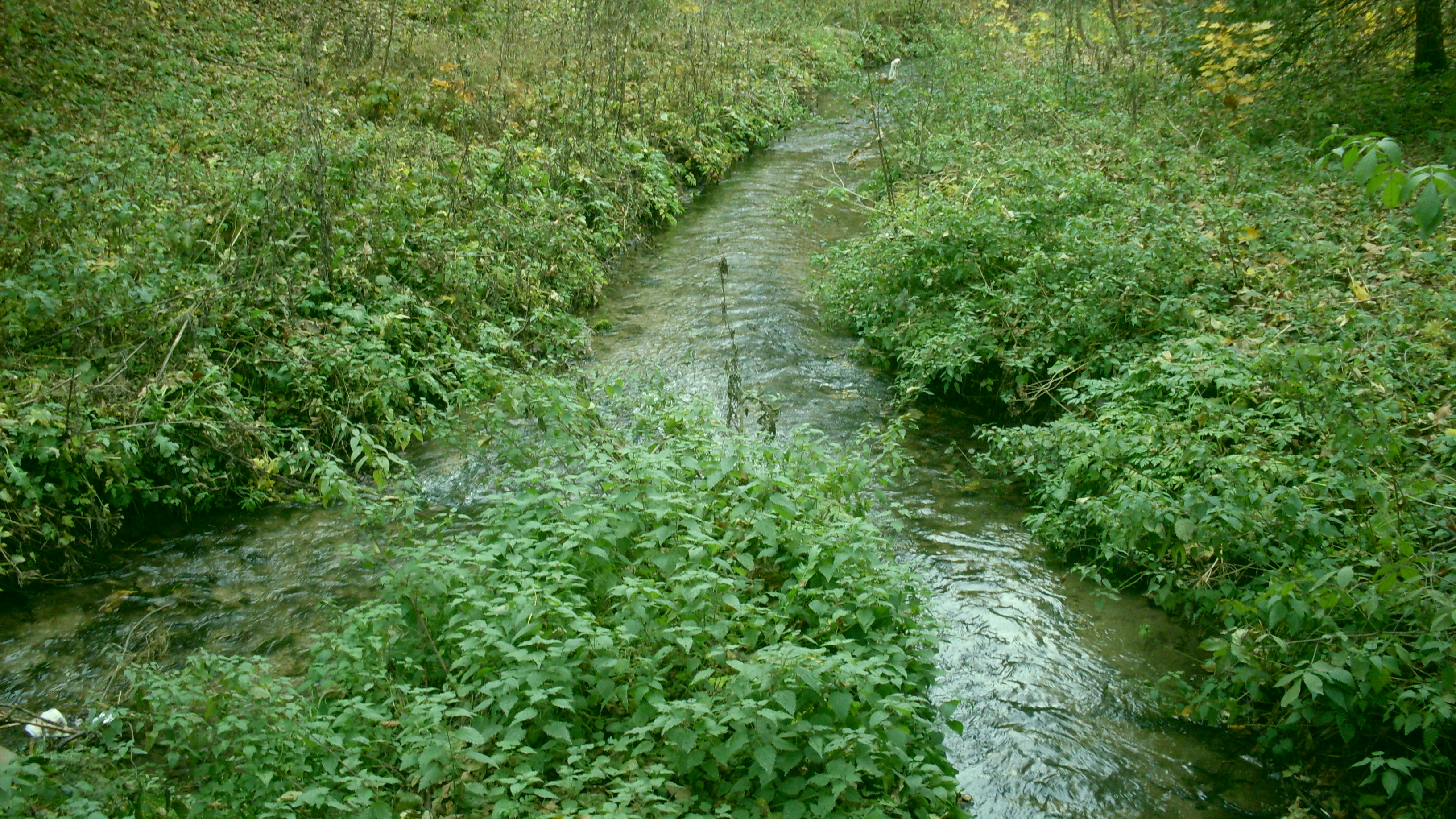 Eliaszówka-Czernka